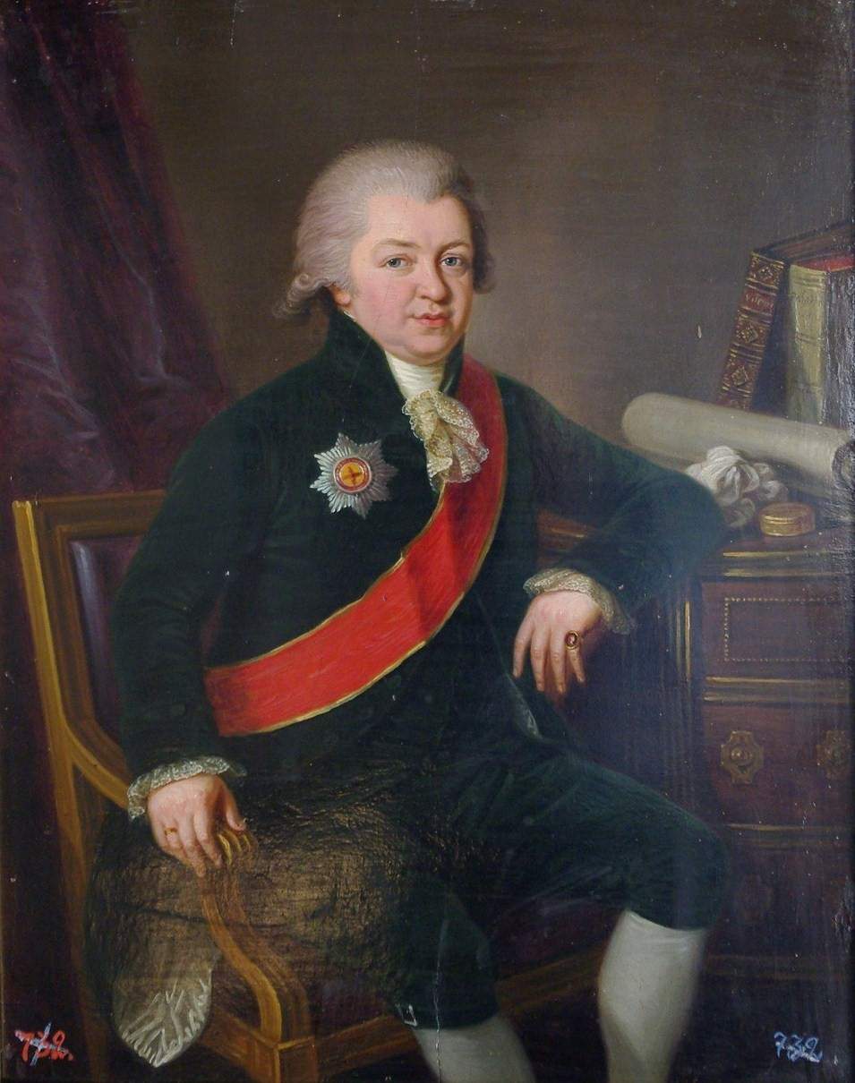 Stepan Borisovich Kurakin (1754 - 8.07.1805)